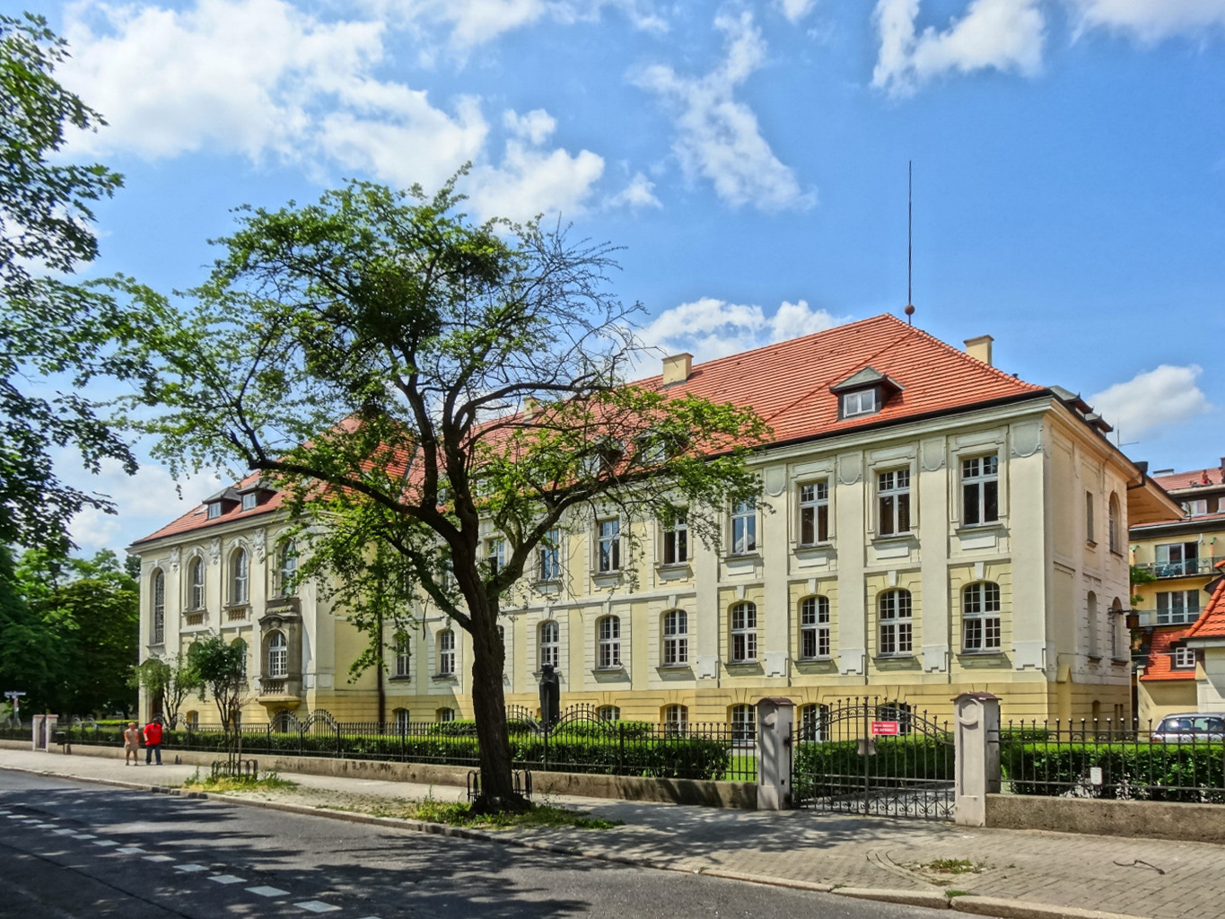 Zespół Urzędu Powiatowego, zbud. 1904-1906, ob. budynek główny Akademii Muzycznej w Bydgoszczy przy ul. Słowackiego